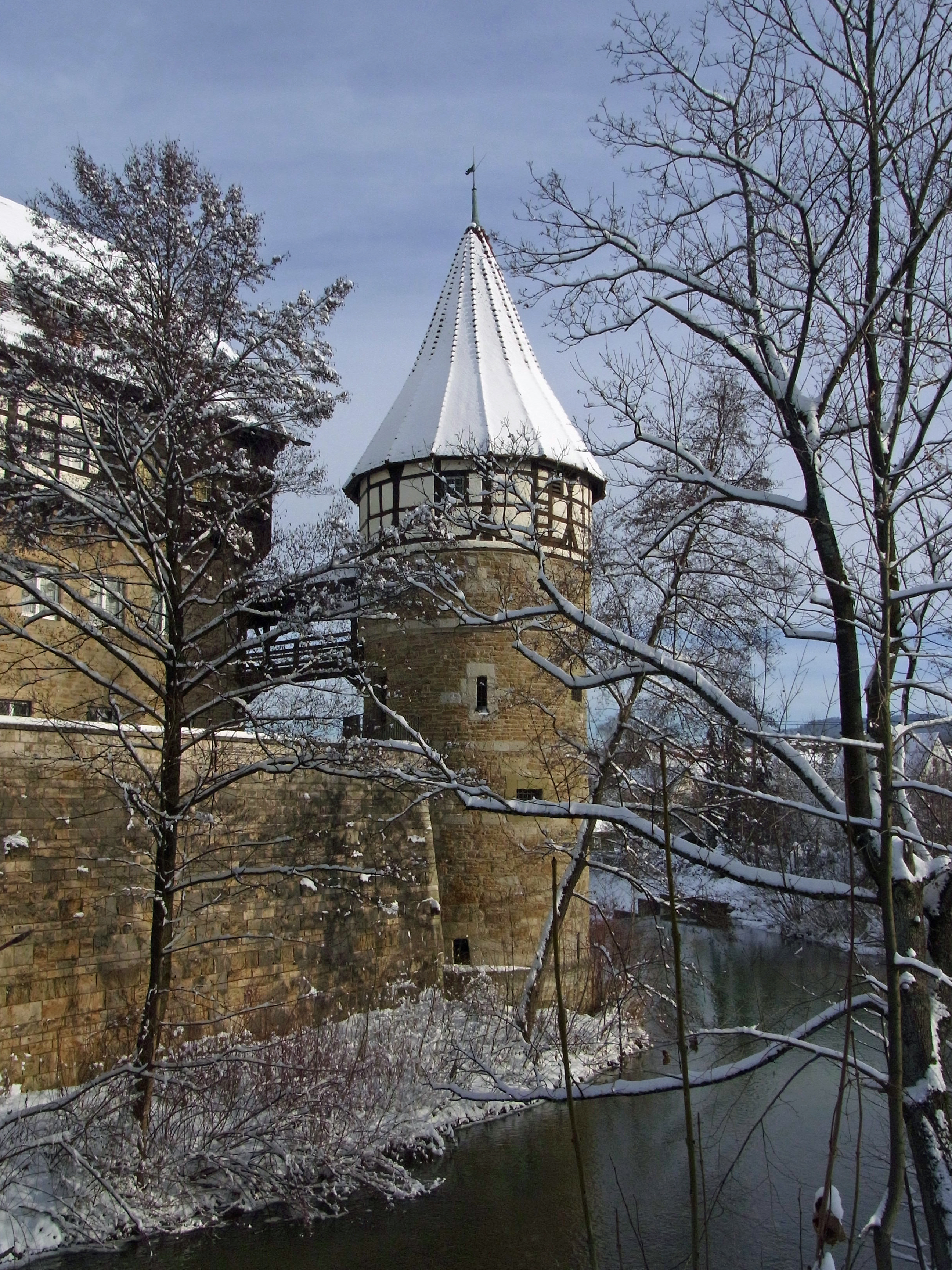 Balingen Zollernschloss